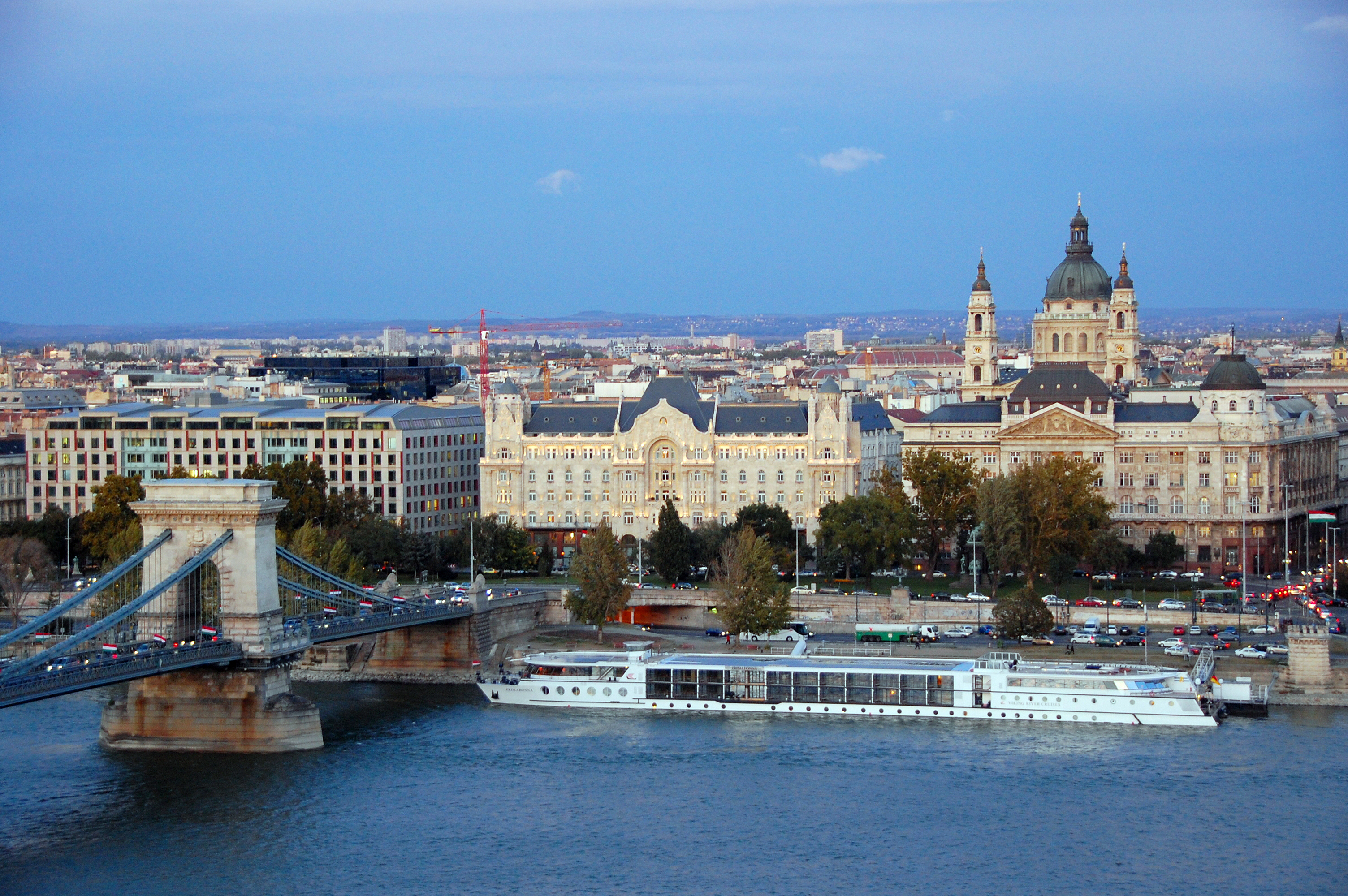 Kabinenfahrgastschiff Primadonna am Anleger Budapest